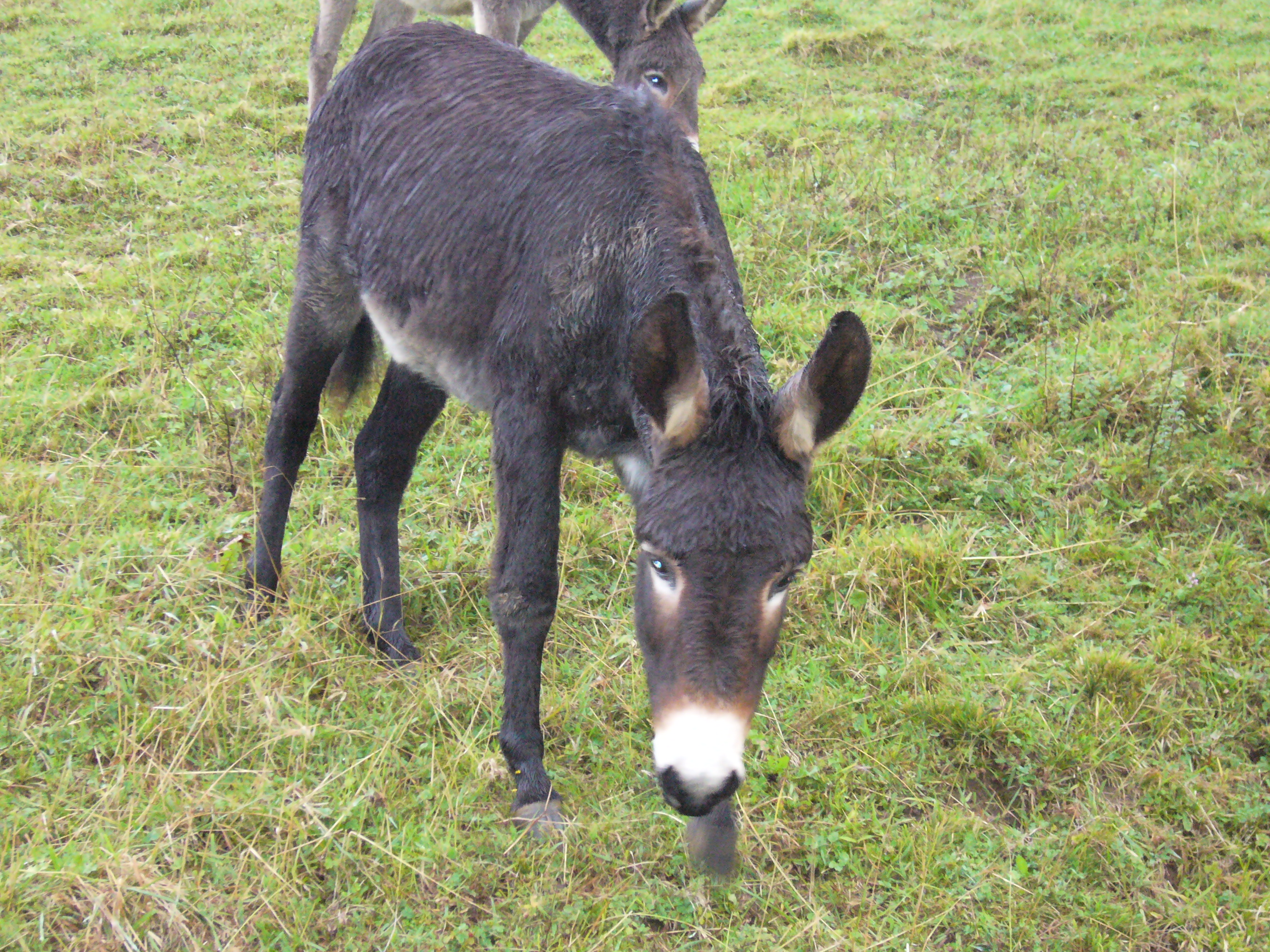 Enkarterriko astoa